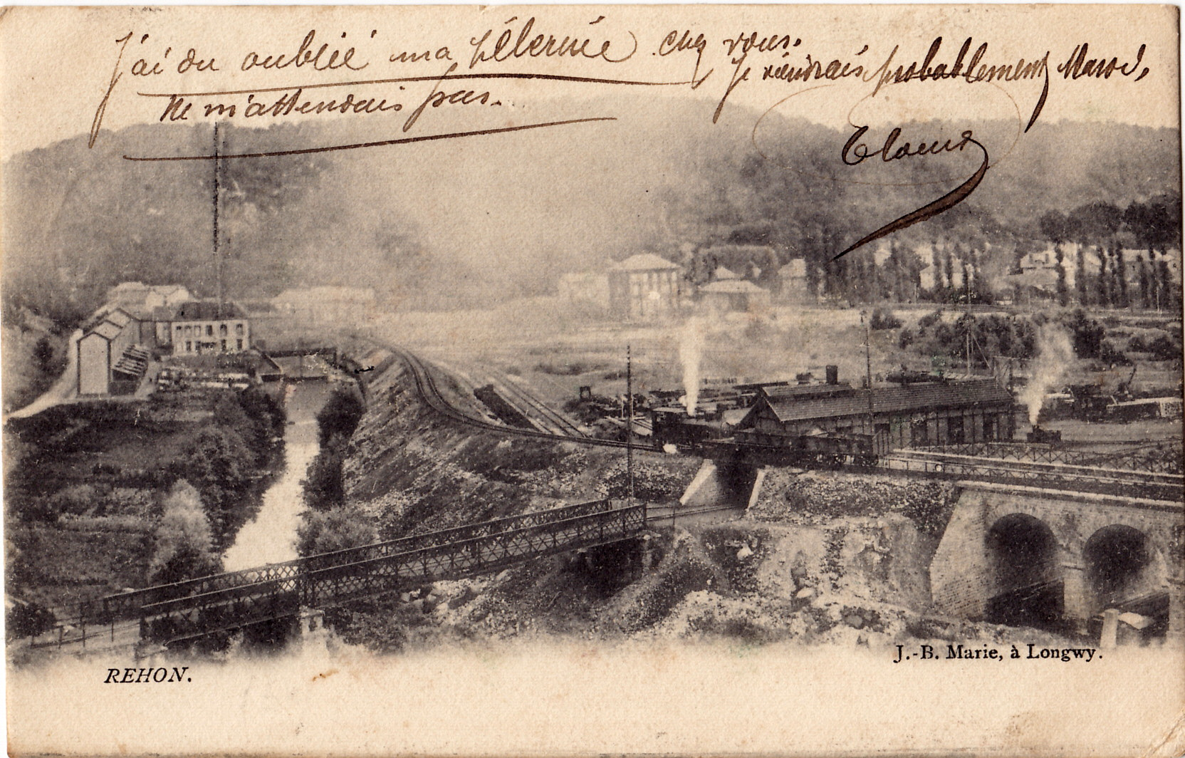 Carte postale ancienne éditée par J. B. Marie : REHON